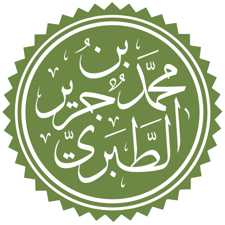 تخطيط لاسم الإمام محمد بن جرير الطبري